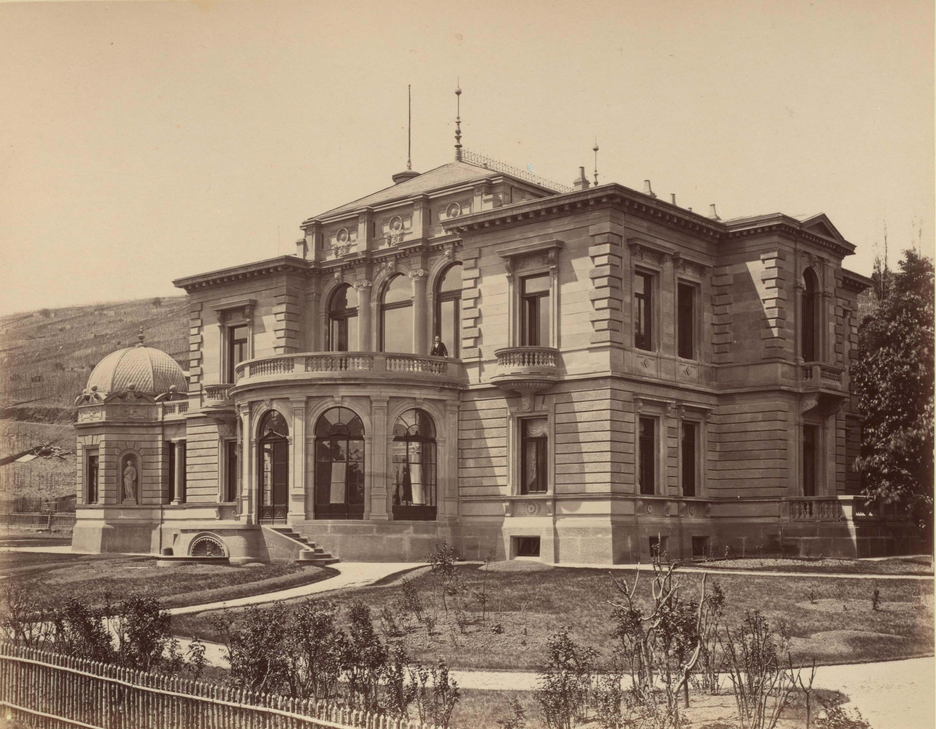 Villa Single, Stuttgart, Mörikestraße 18, Architekt: Carl Beisbarth, Fertigstellung: 1872, Bauherr: Heinrich Single, Oberingenieur (1910 abgerissen)